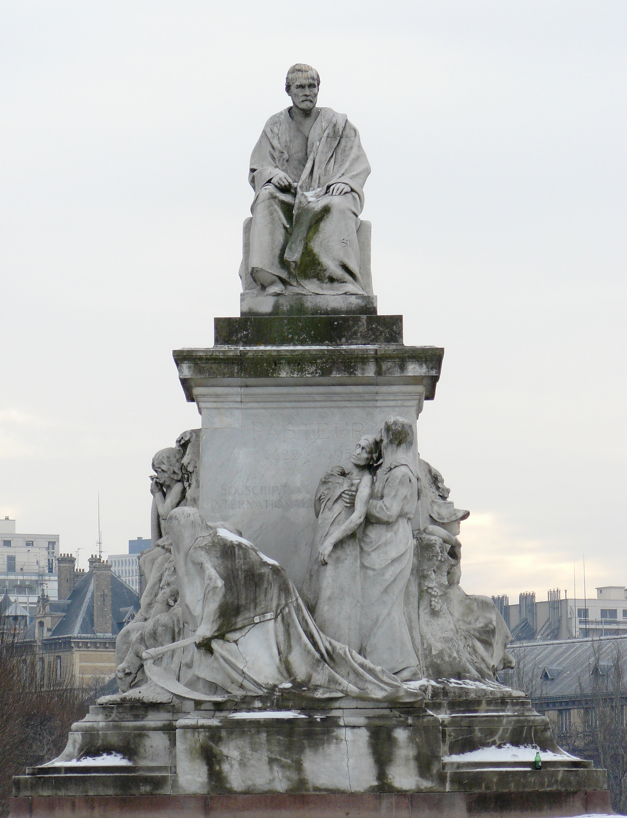 Monument à Pasteur, souscription internationale, au centre de la Place de Breteuil, Paris (7ème), dernière oeuvre du sculpteur Alexandre Falguière - 1900-1903 - Terminée par Victor Peter.